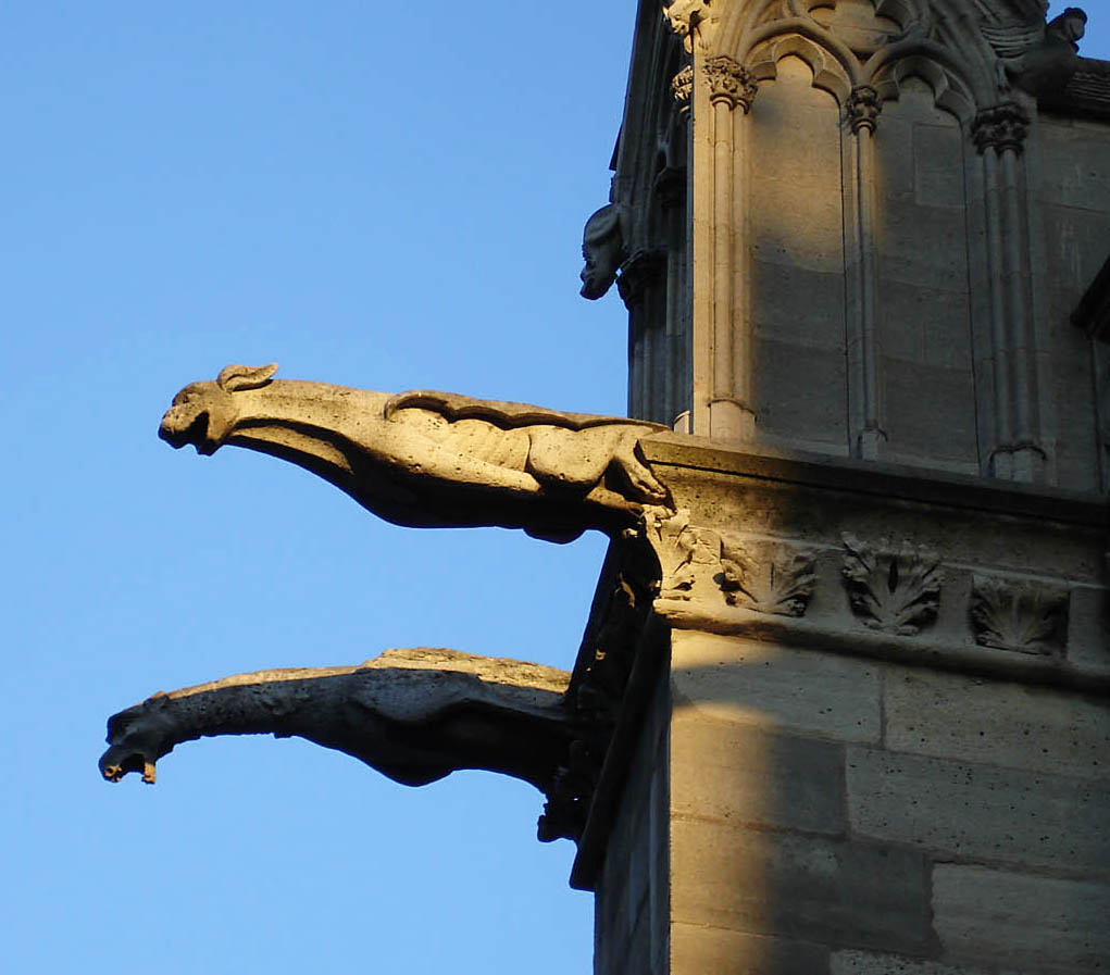 Cathédrale Notre-Dame de Paris (France). Gargouilles sur la face nord du chœur.